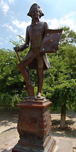 пам’ятник Хосе де Рібасу в Одесі